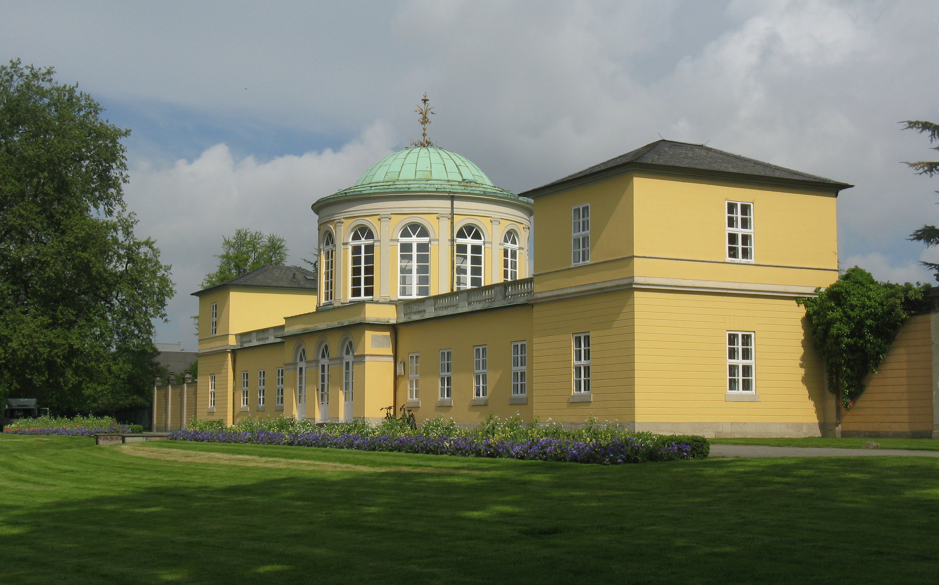 Bibliothekspavillon in Hannover-Herrenhausen, Straßenseite